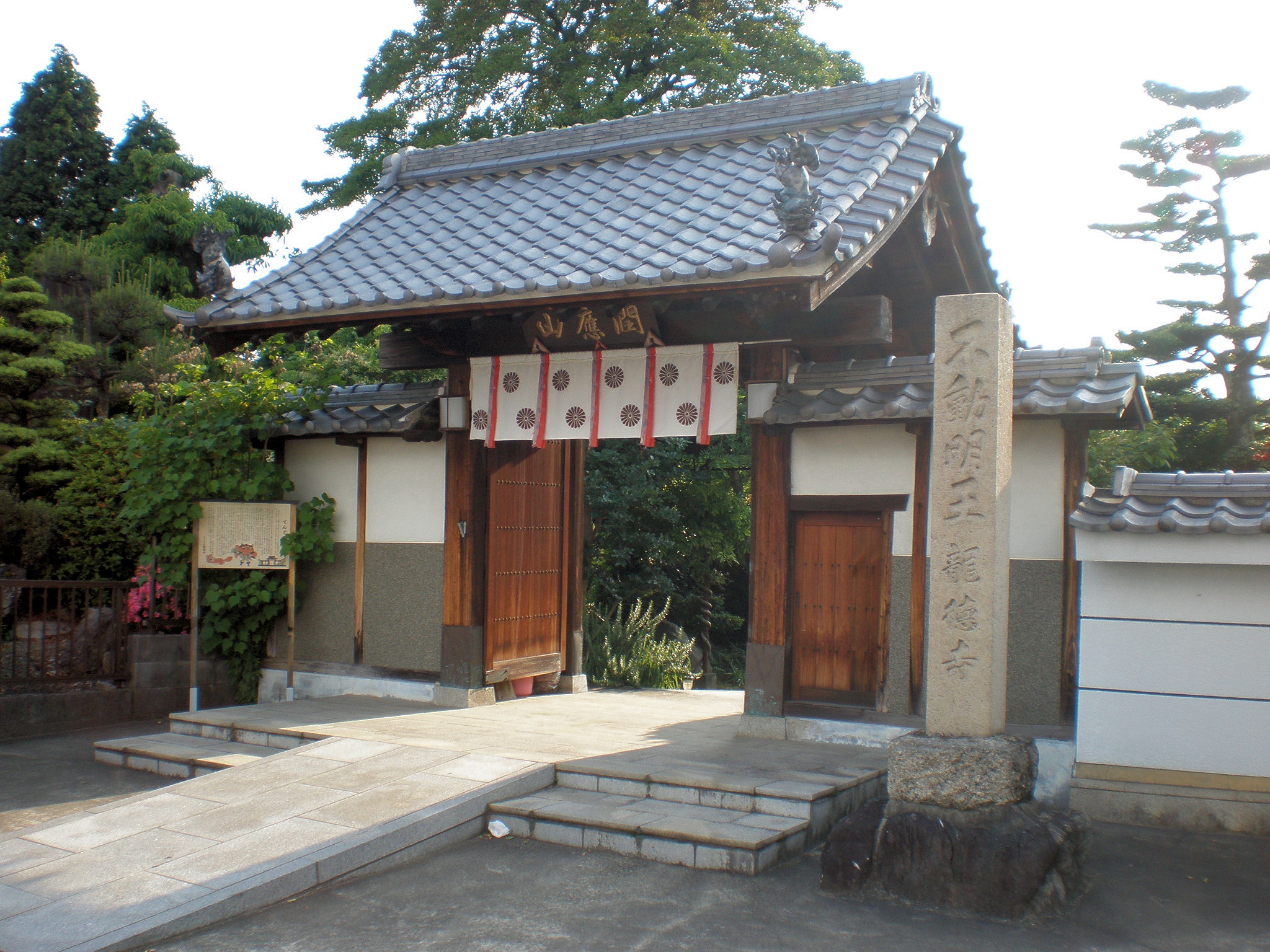 愛知県小牧市にある龍徳寺